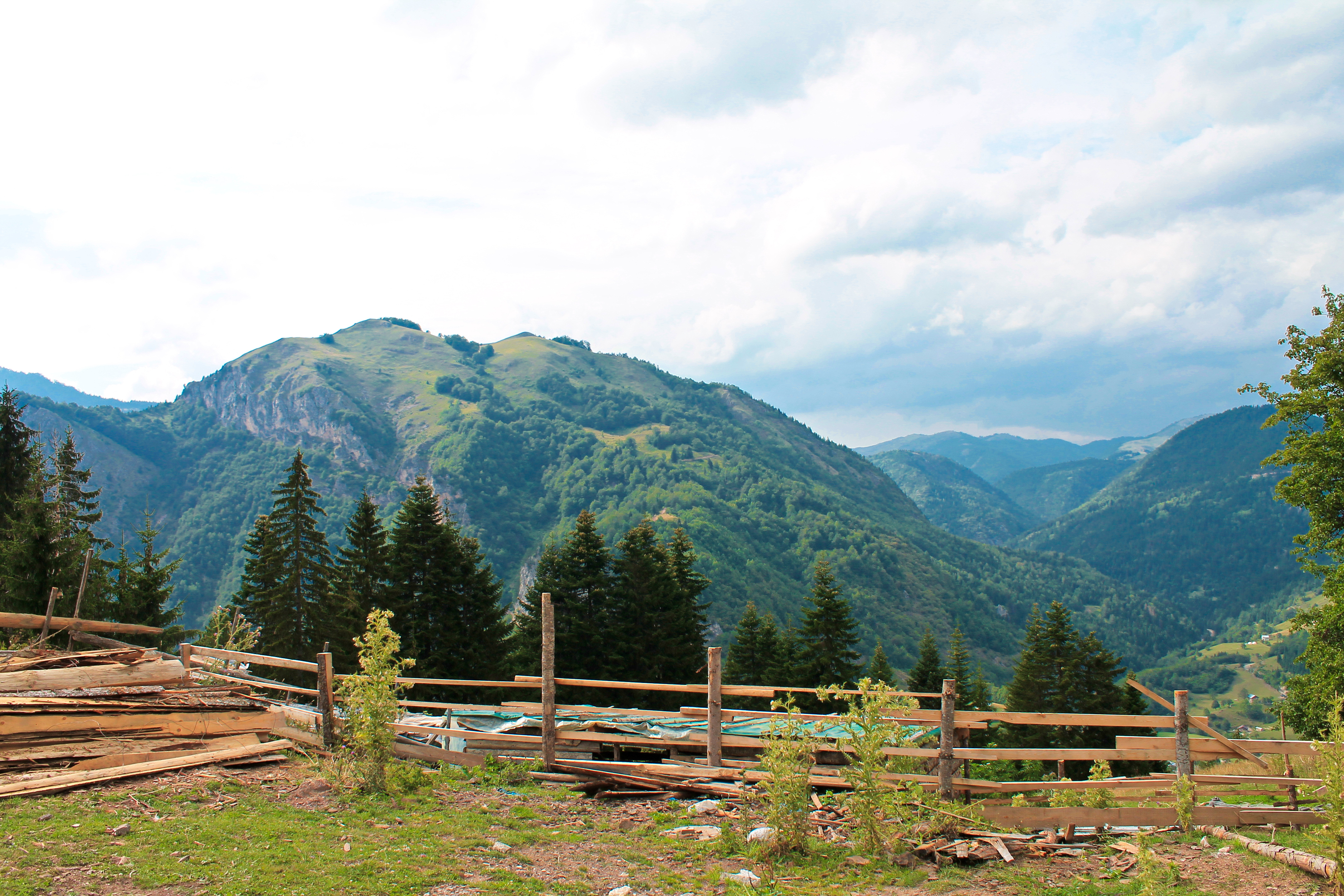 Gryka Rugovës - Pejë (2)